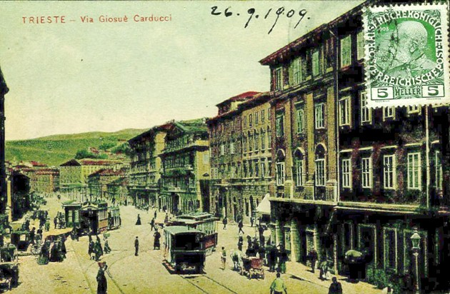 Historische Bildpostkarte mit Straßenszene aus Triest, Aufnahme 1909 oder älter